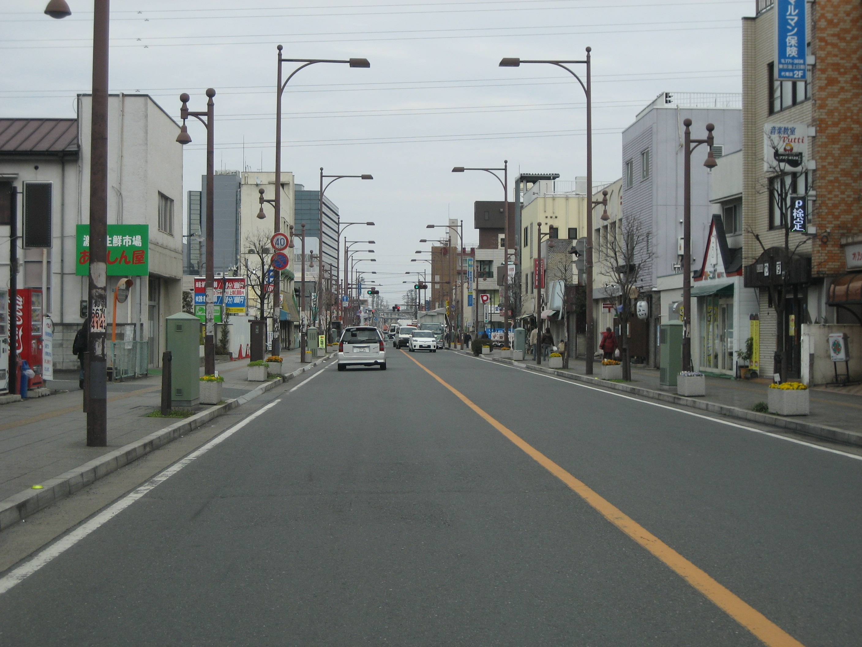 埼玉県道133号線上尾市内